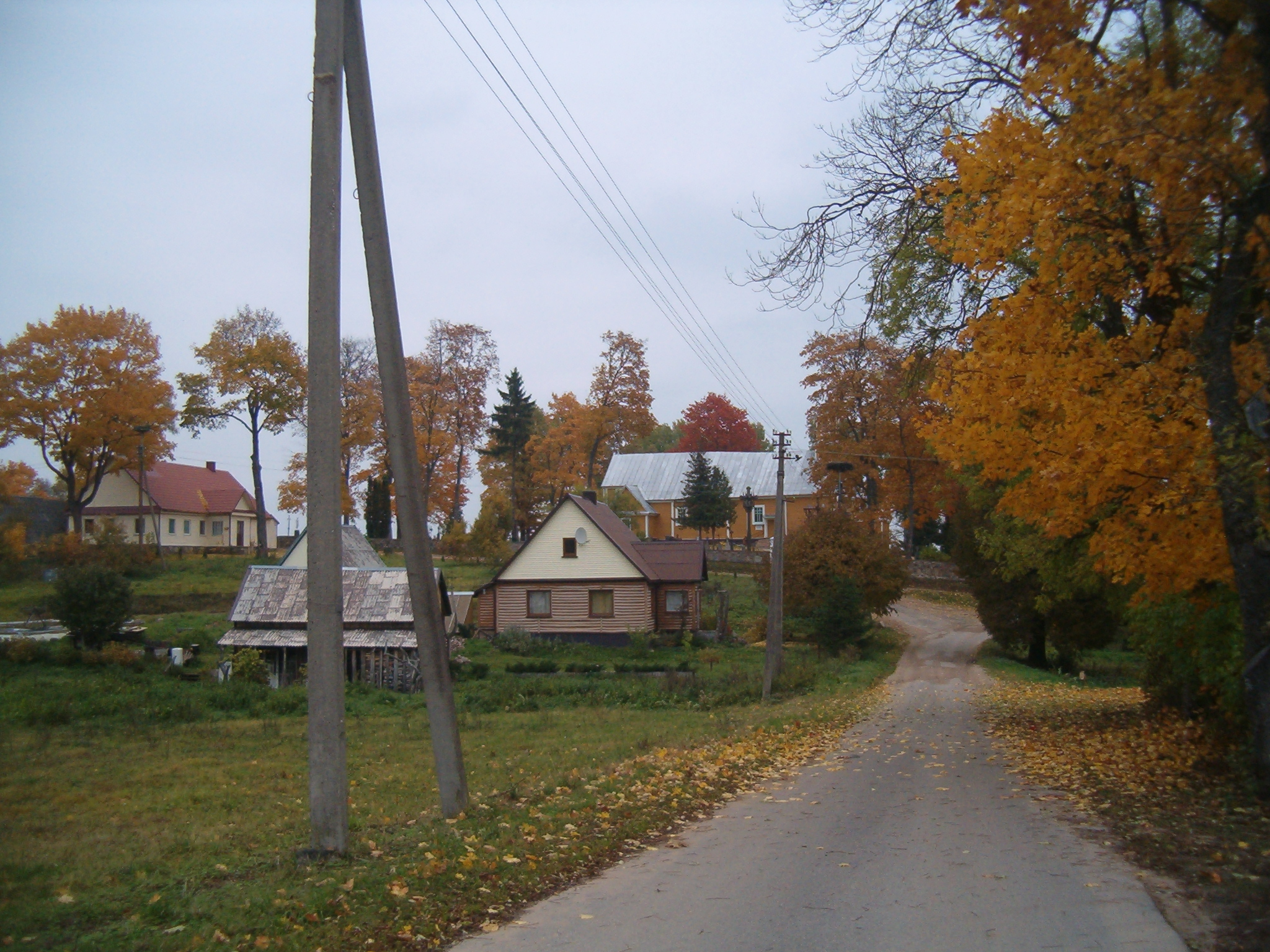 Aviliai II, Lithuania